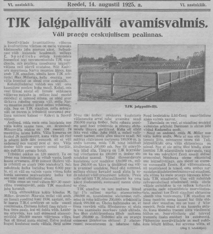 TJK jalgpalliväli avamis valmis.